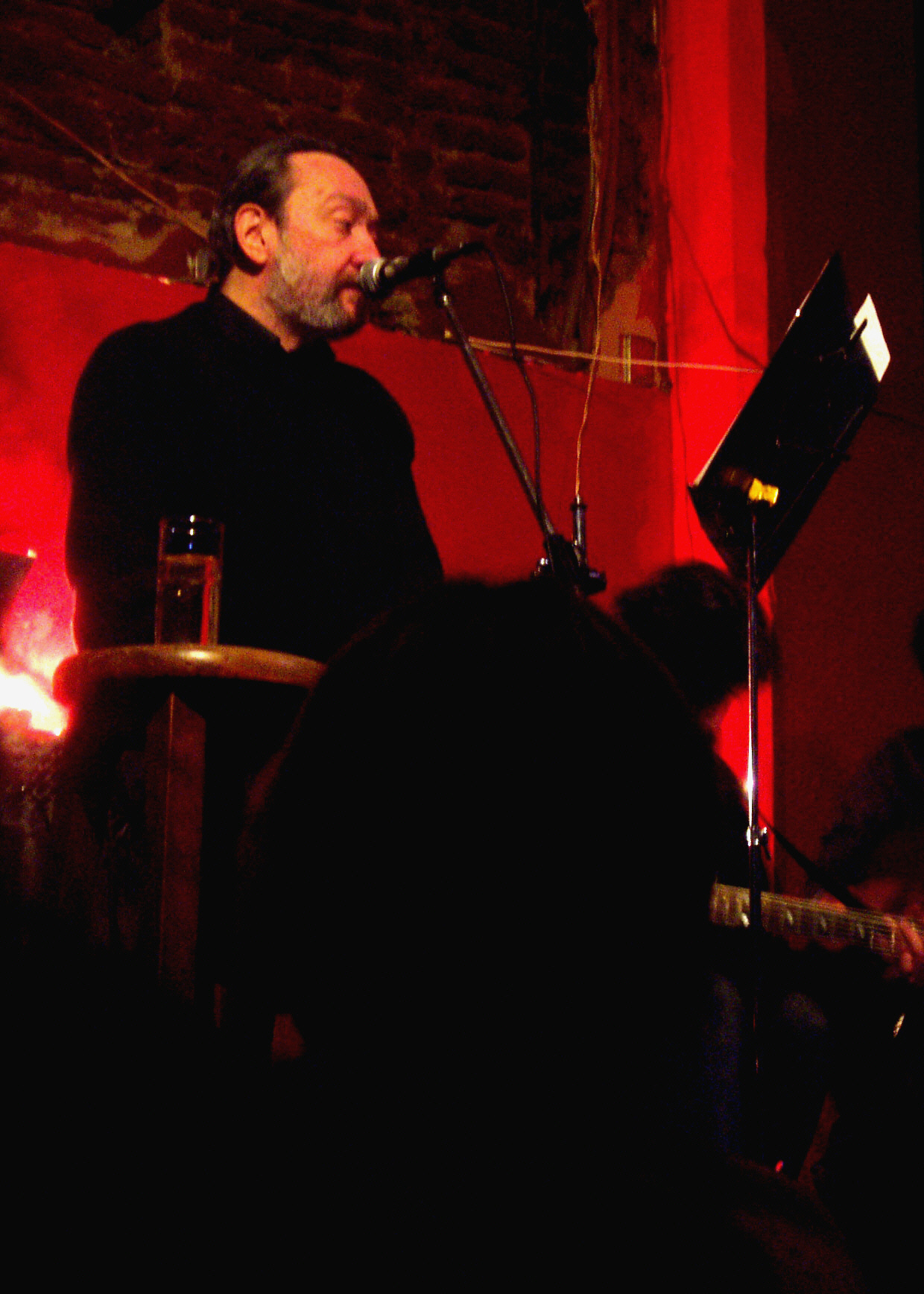 Fotografía del músico uruguayo Eduardo Darnauchans en un espectaculo brindado en "Capiloncho" de Ciudad Vieja (Montevideo - Uruguay) el 28 de Junio de 2005.